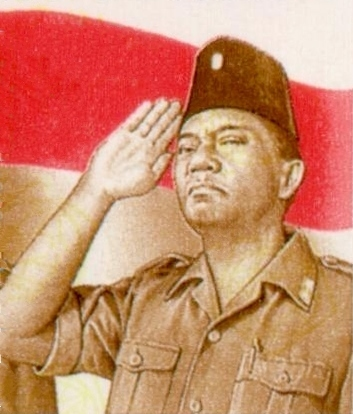 Oerip Soemohardjo